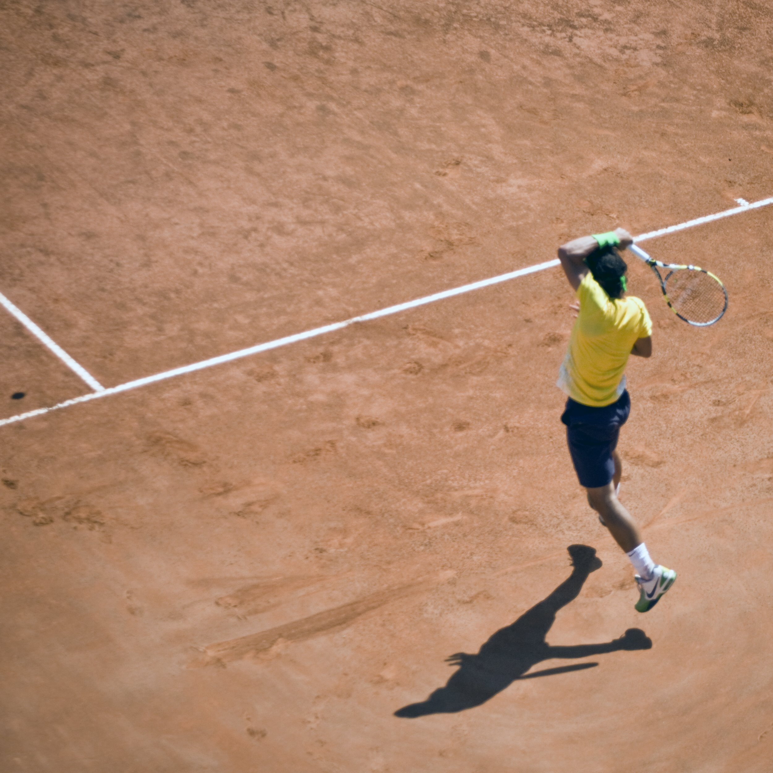 Rafael Nadal in Rome 2011